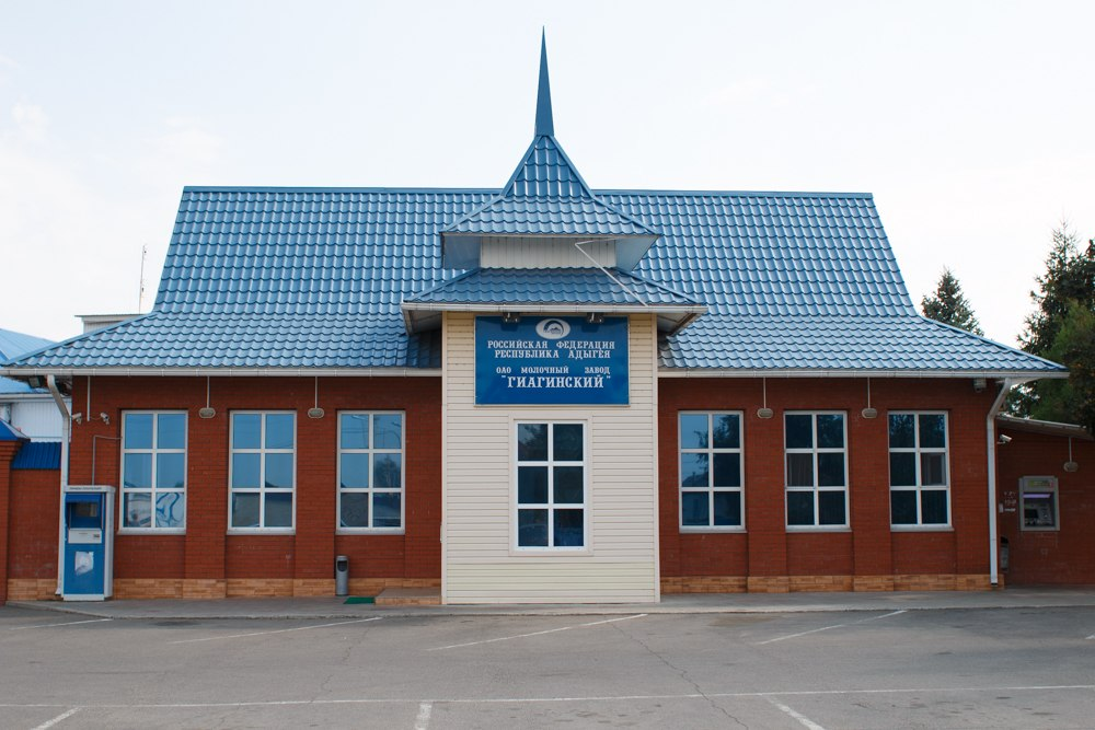 Административное здание ОАО Молочный завод «Гиагинский».